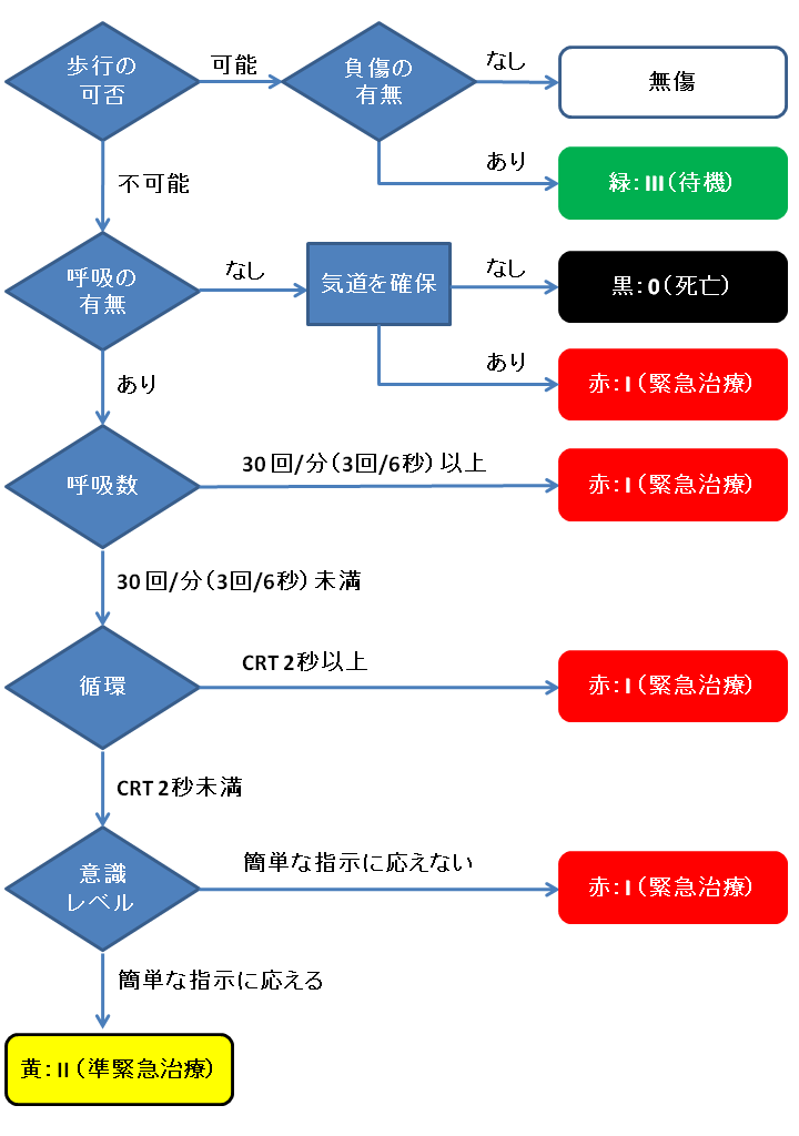 『外傷初期診療ガイドライン日本版 改訂第3版』を参考に作成。トリアージの際に使用されるフローチャートである。